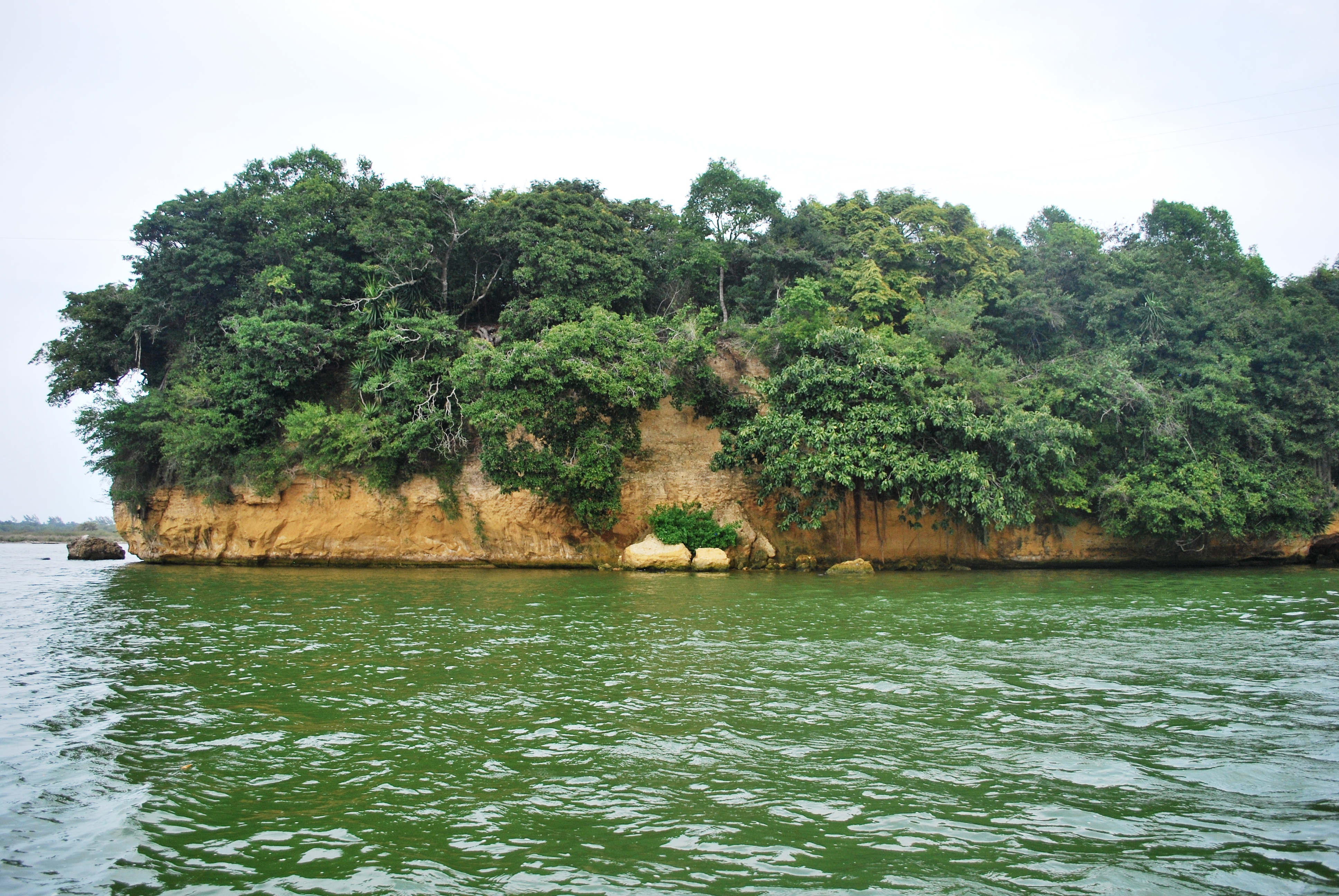 Farallon Island in the Cazones River at Barra de Cazones, Veracruz